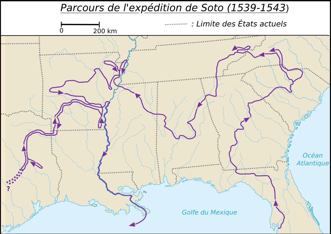 Carte représentant l'expédition de Hernando de Soto, dans le sud-est des Etats-Unis actuels.